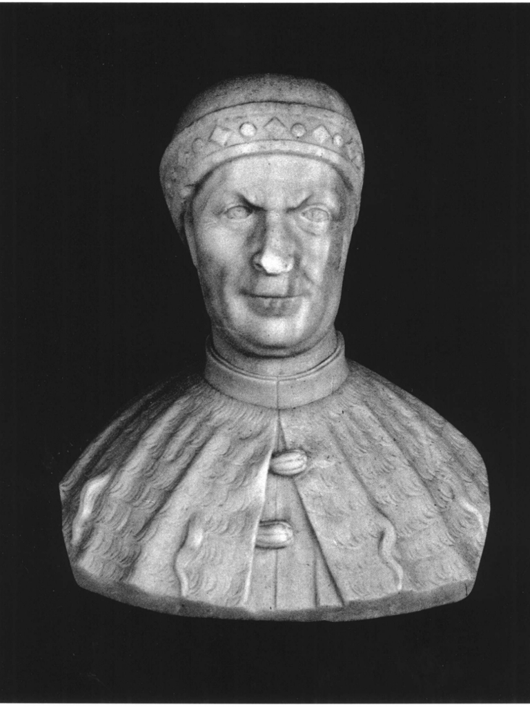 Busto di Domenico Michiel, opera di Luigi Piccoli (1860-1861). Il busto fa parte del Panteon Veneto, conservato presso Palazzo Loredan di Campo Santo Stefano a Venezia.